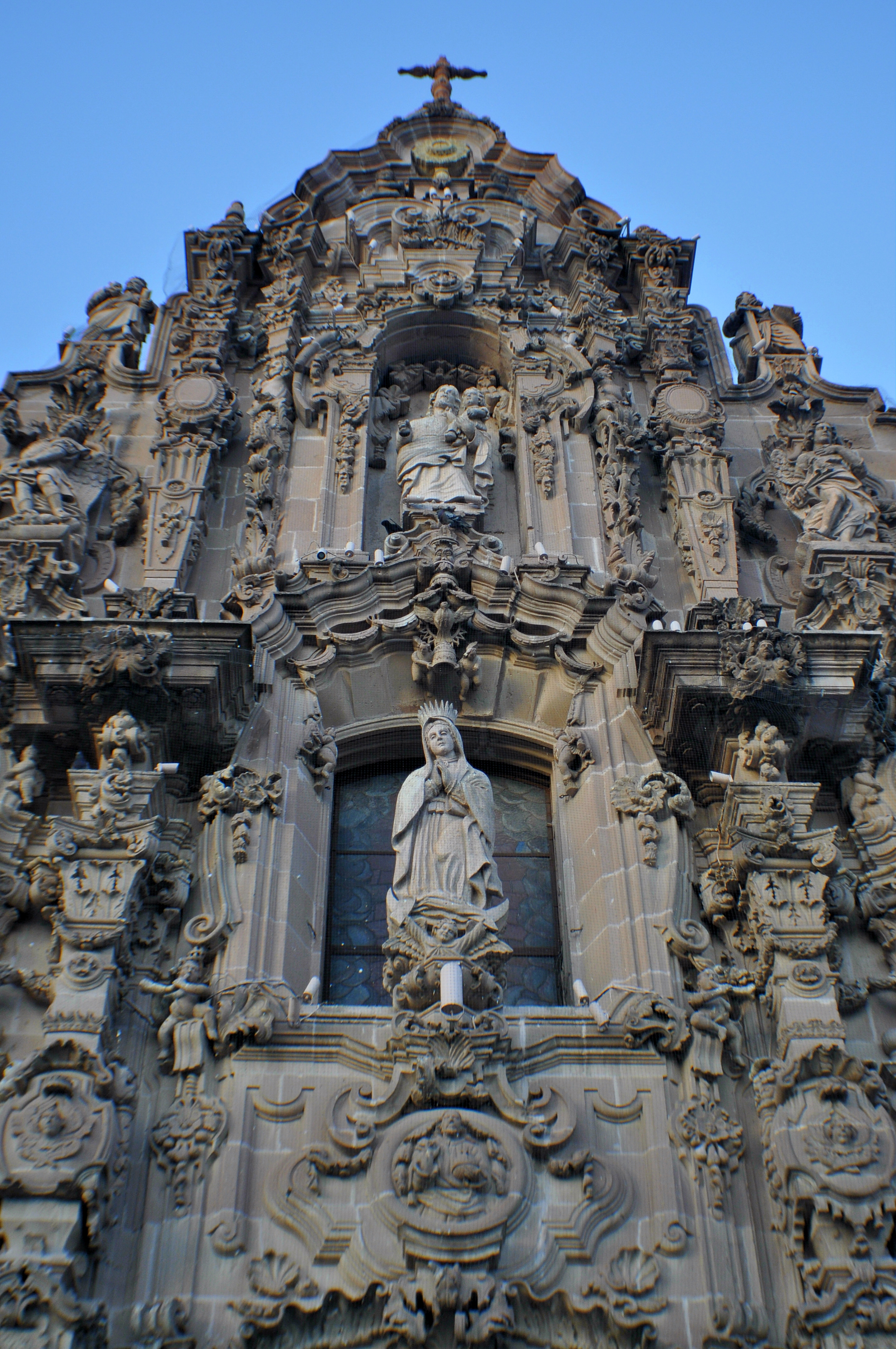 Por el @viajeroPeligro